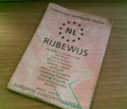 Eigen foto van eigen rijbewijs. Slechte foto, maar tot er een betere komt zal deze wel volstaan.